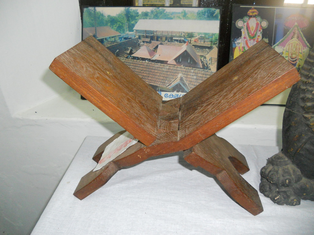 ഗ്രന്ഥപ്പലക